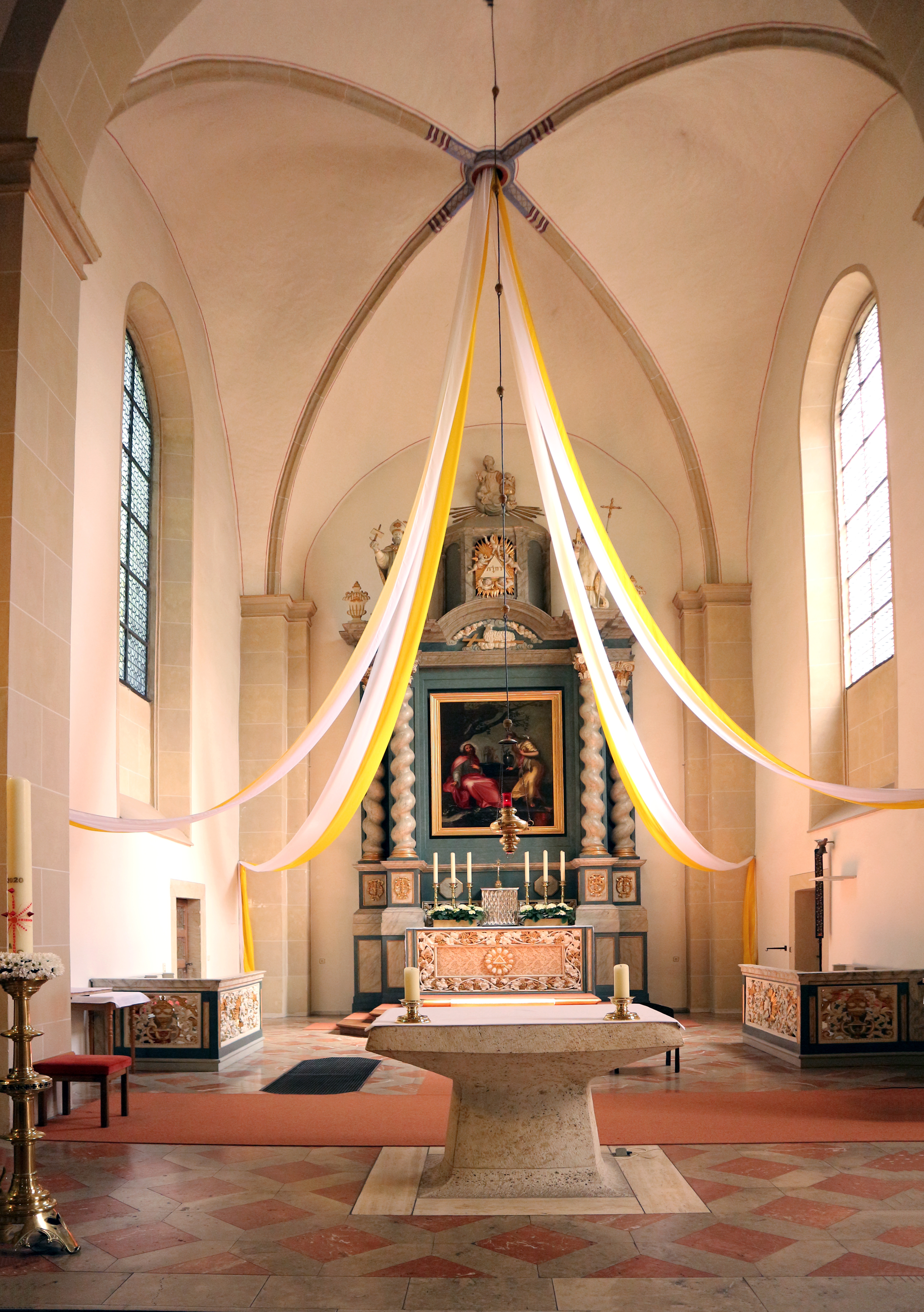 St. Lambertus innen Altar